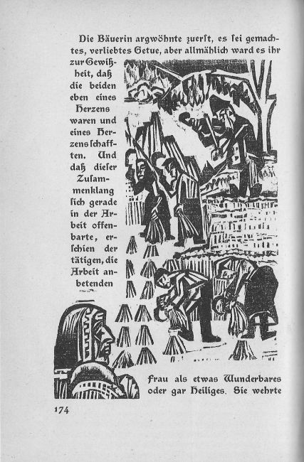 Buchillustration: Neben der Heerstrasse, 1923, Seite 174